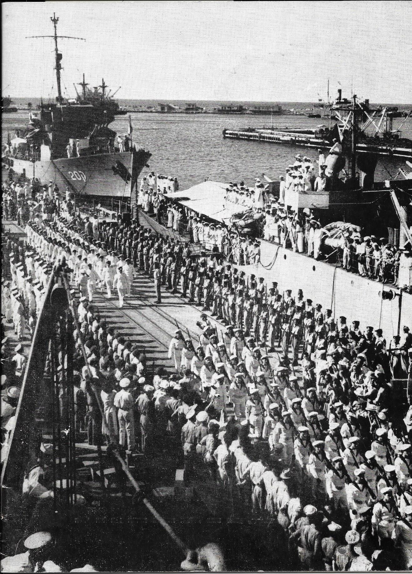 אח"י הגנה בתקבלת בנמל חיפה בחזרתה ממבצע קולומבוס 5 יולי 1951.